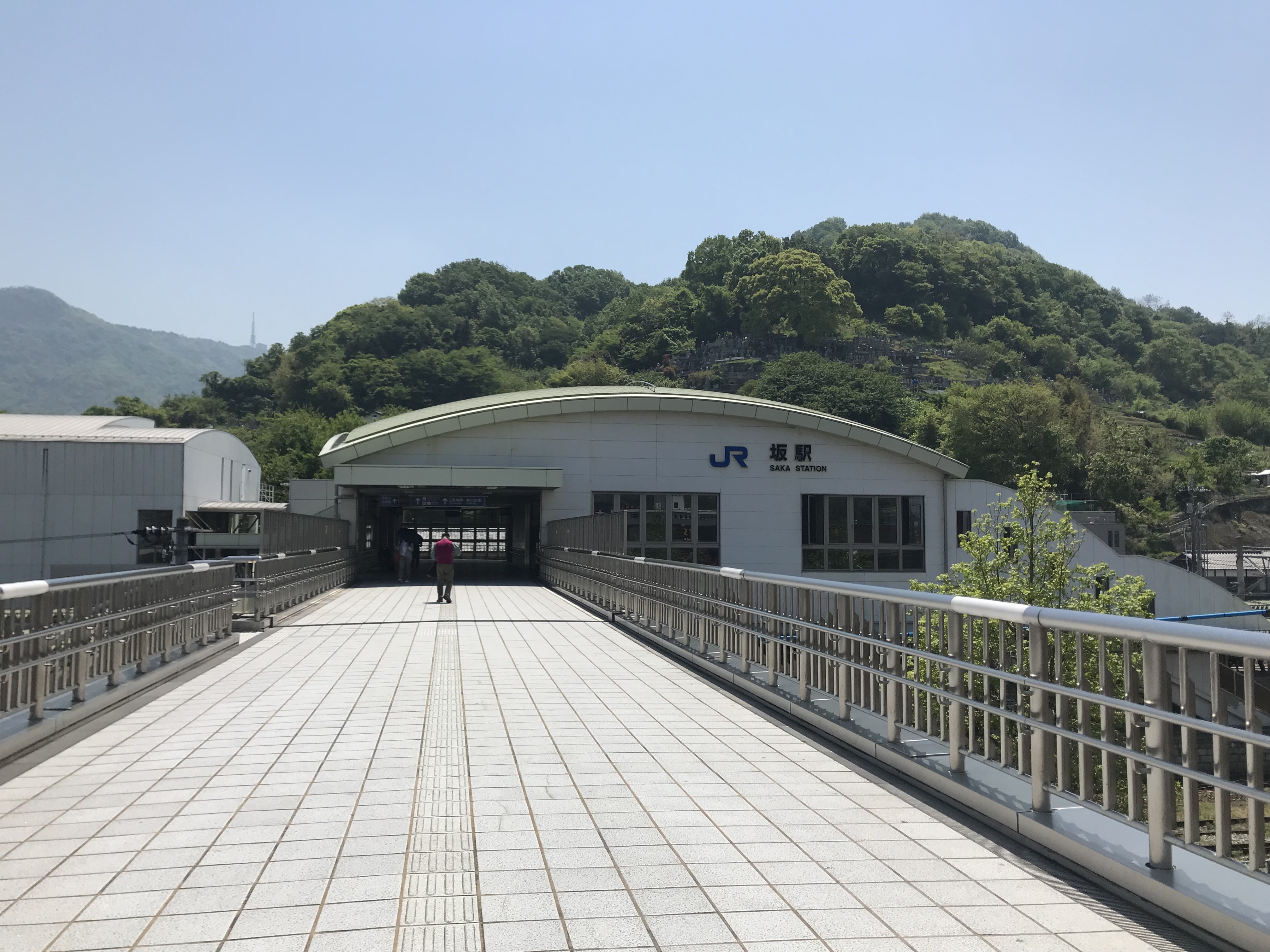 坂駅の駅舎